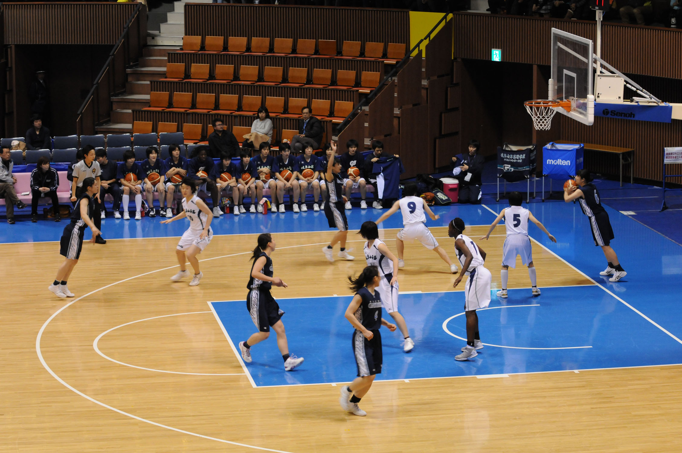 2016年全日本総合バスケットボール選手権大会二回戦、岐阜女子高校対愛知学泉大学。代々木第二体育館で。